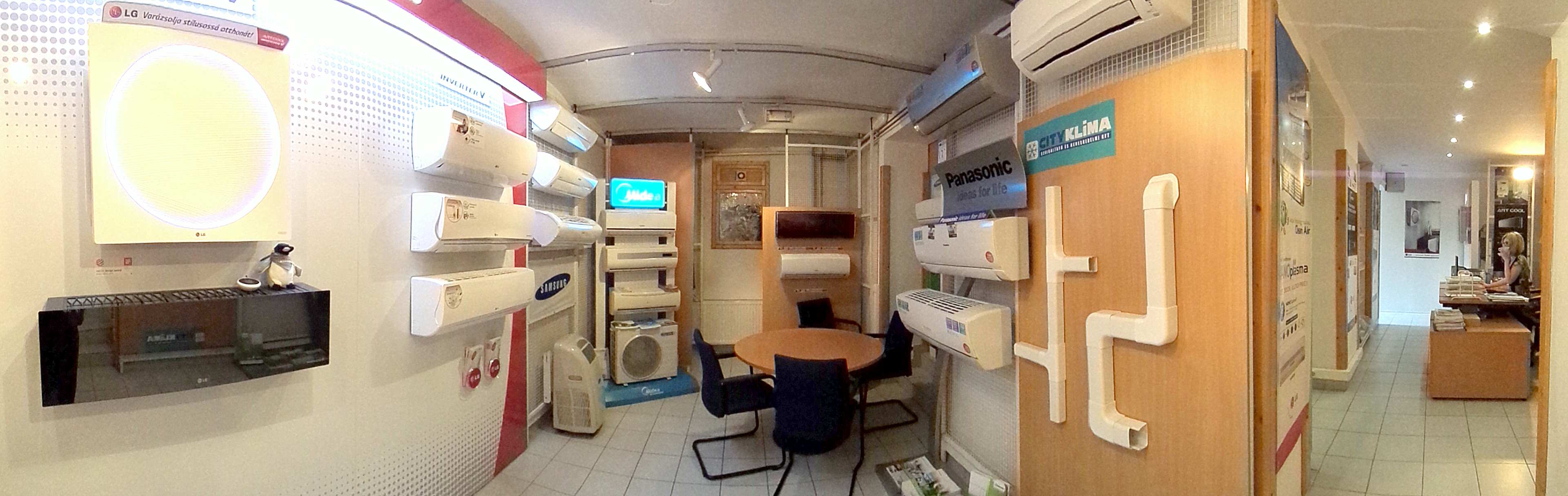 Több fajta és féle klíma beltéri és kültéri egy bemutatóteremben.